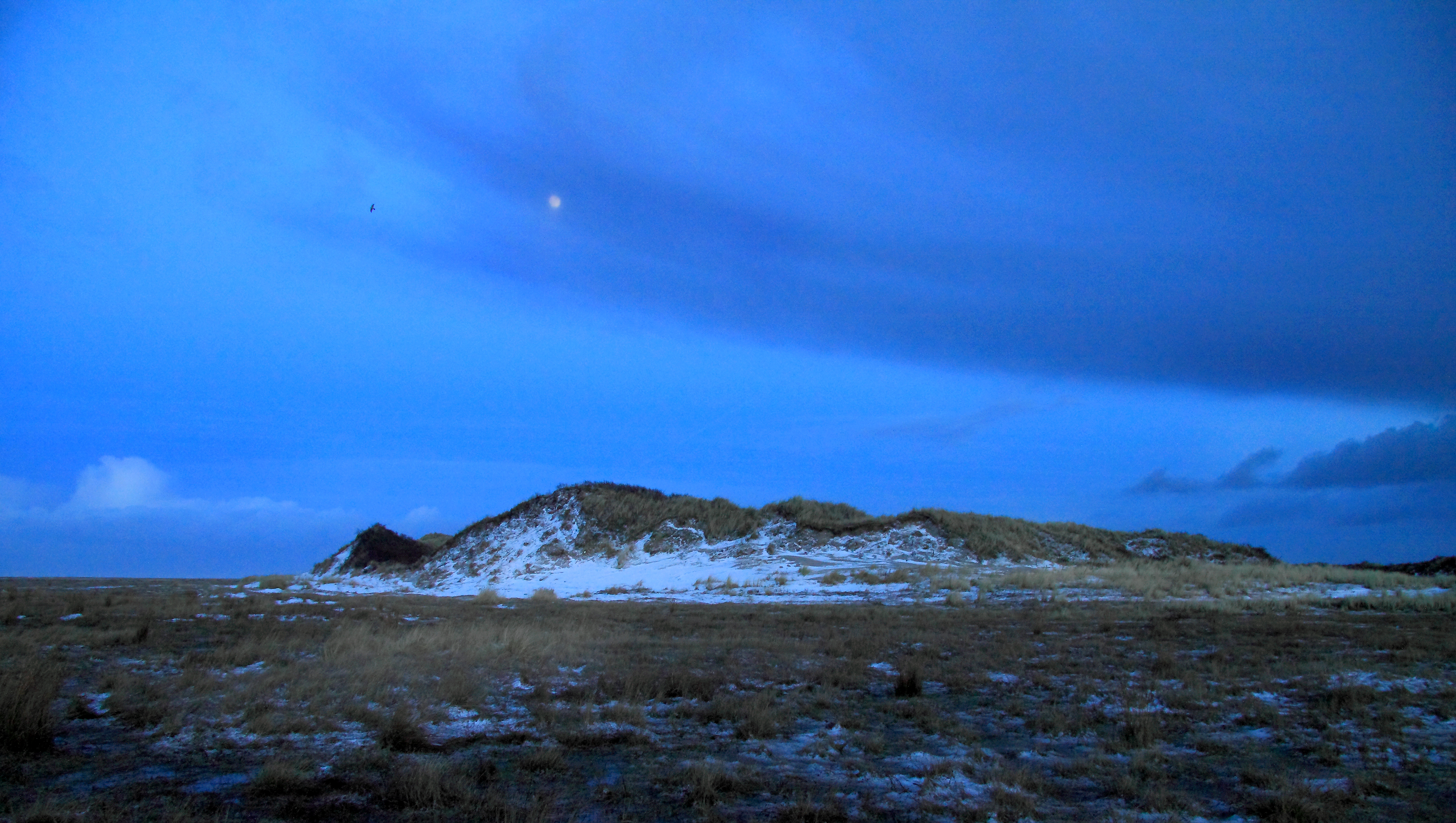 Maan, slechtvalk en een wegtrekkende sneeuwbui in de late avond bij de eerste doorbraak aan het einde van de stuifdijk op Schiermonnikoog. Het begin van een ruig landschap dichtbij het gevoel van oer-nederland. Gemaakt in het z.g fotografische blauwe uurtje. De zon is onder maar het daglicht nog niet helemaal verdwenen. This is a photo or sound file made in Schiermonnikoog National Park in the Netherlands, with the main subject of the file in the category: landscapes